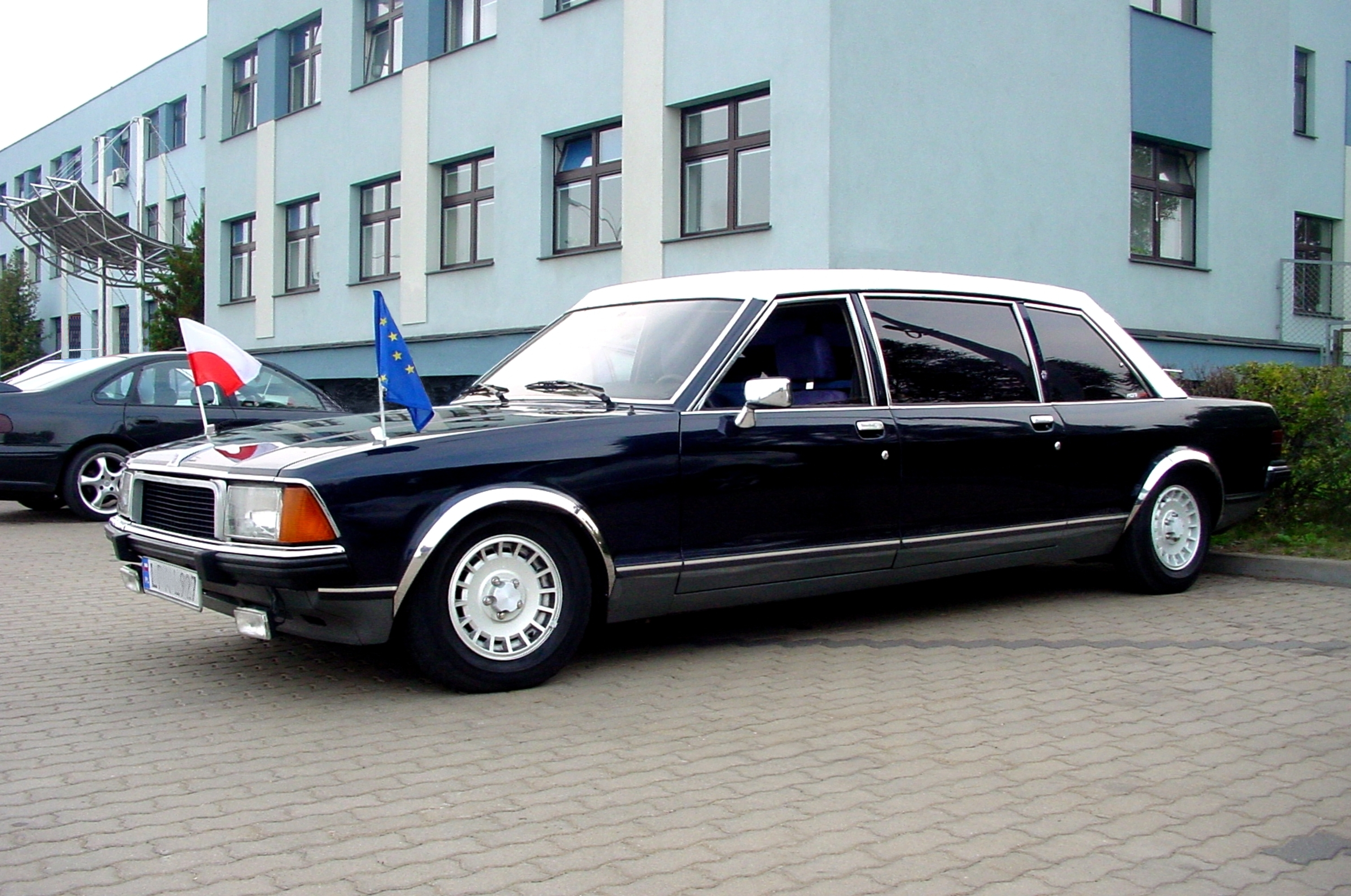 Ford Granada Coleman-Milne Limited Limousine GROSVENOR VI 2.8 V6